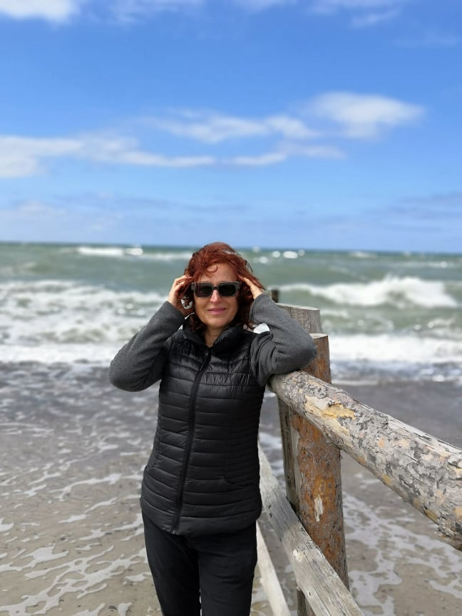 Zdjęcie Doroty Combrzyńskiej-Nogala